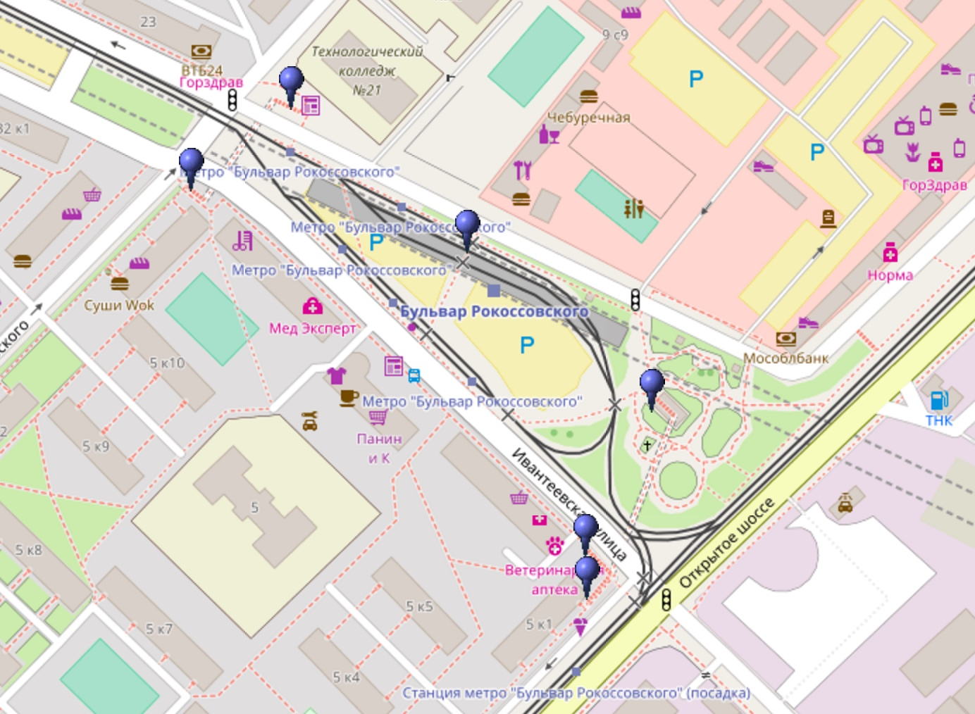 Plan de situation de la station Boulvar Rokossovskovo (métro de Moscou) et de ses bouches.